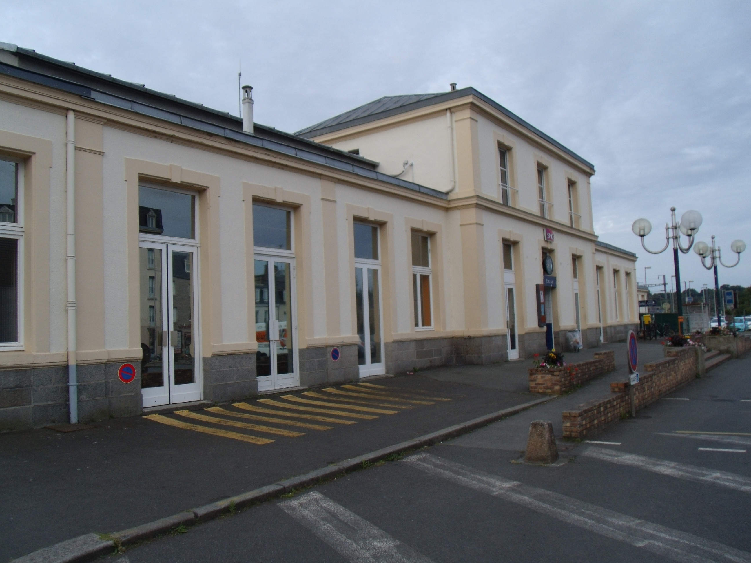 Lamballe, le bâtiment voyageurs